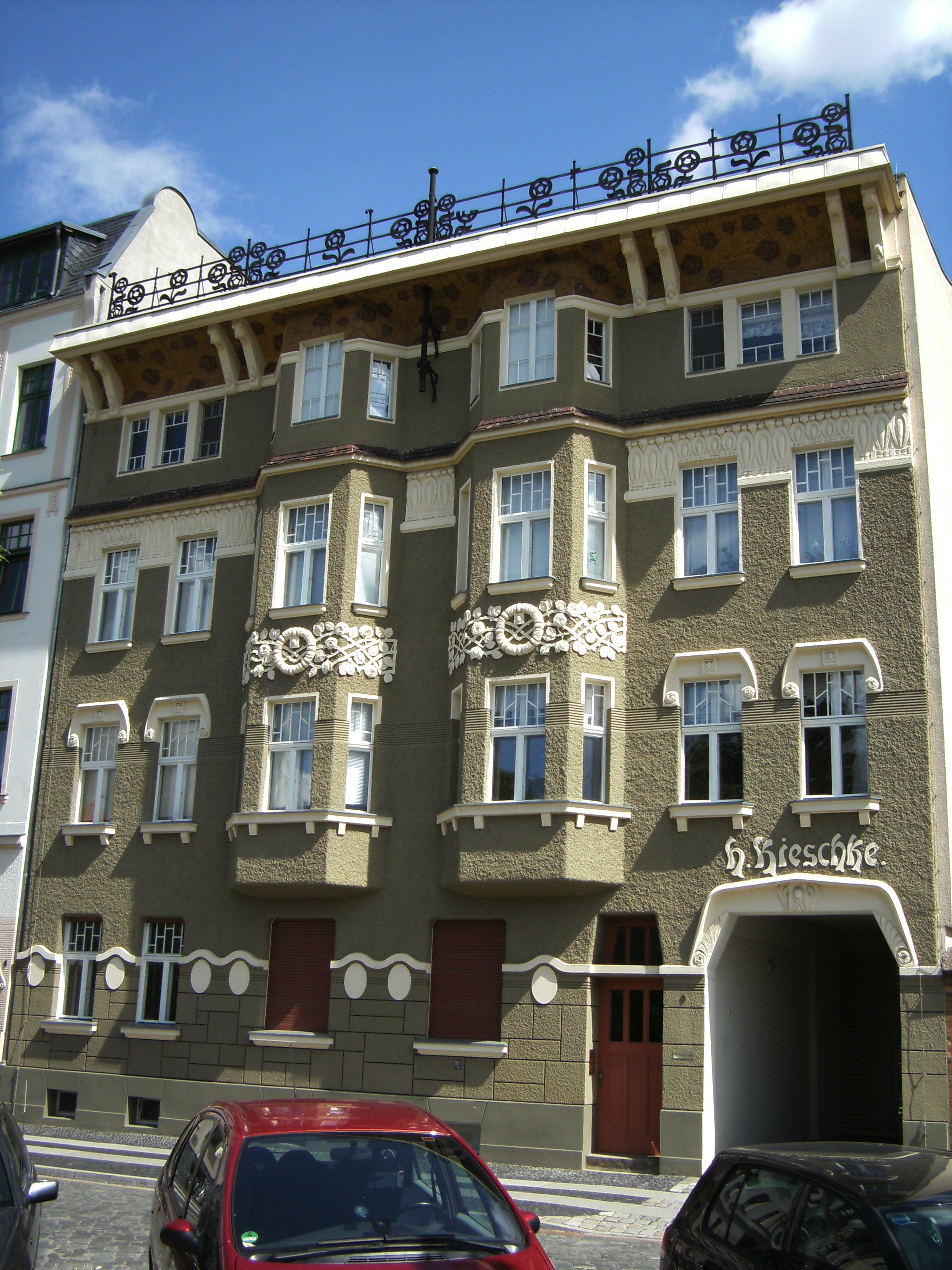 Wernerstr. 9